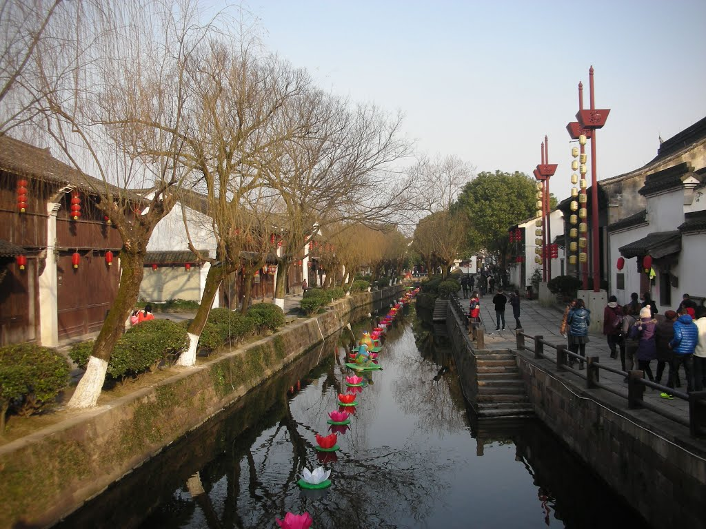 浙江省海寧市鹽官古鎮。